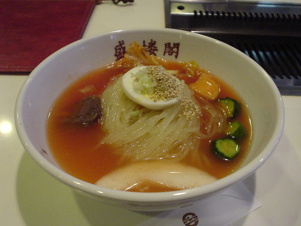 盛岡冷麺（盛岡市盛岡駅前通15-5、ワールドインGENプラザ 2F、「焼肉・冷麺 盛楼閣」[1]）盛岡冷麺